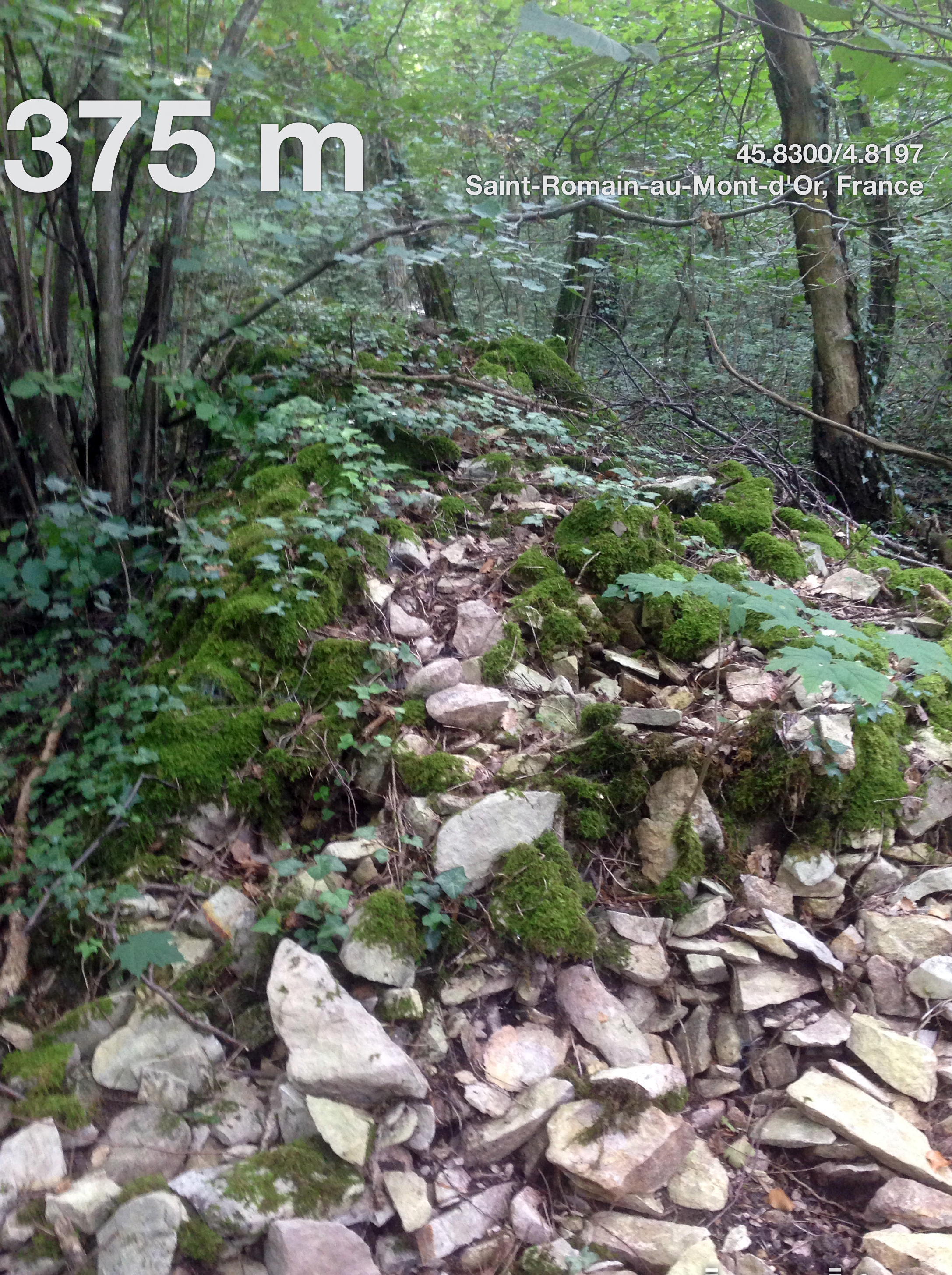 Mur en ruine unique vestige du site de la batterie de la Fêta. L'une des batteries associées au Mont Verdun pour la deuxième ligne de défense de Lyon